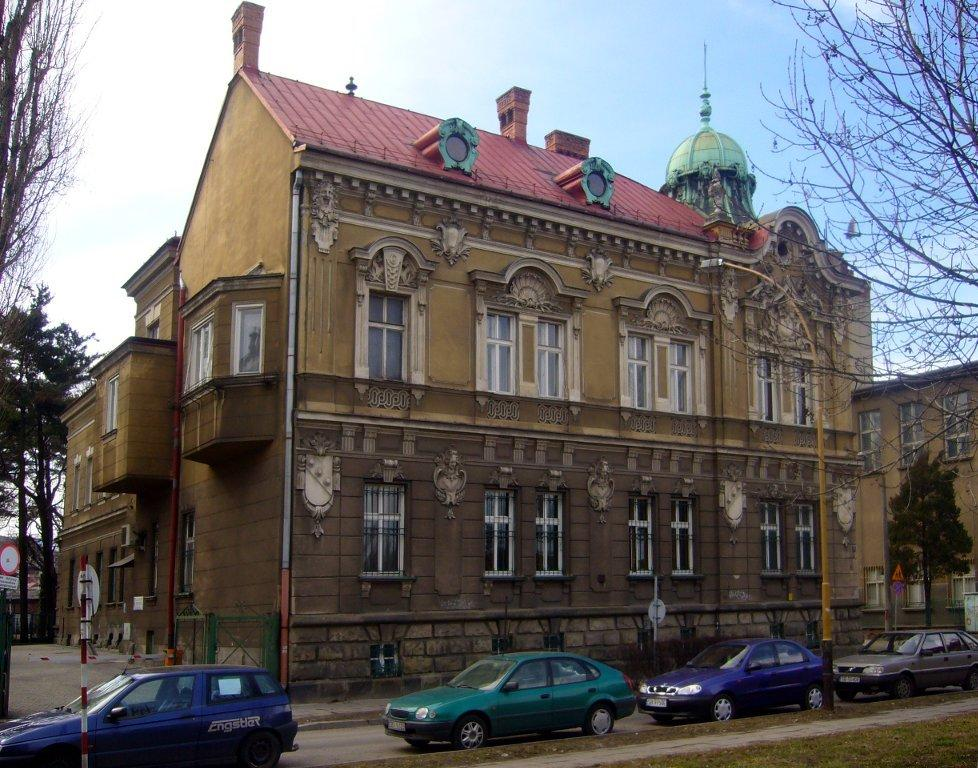 Gmach Wojewódzkiej Biblioteki Pedagogicznej w marcu 2010.